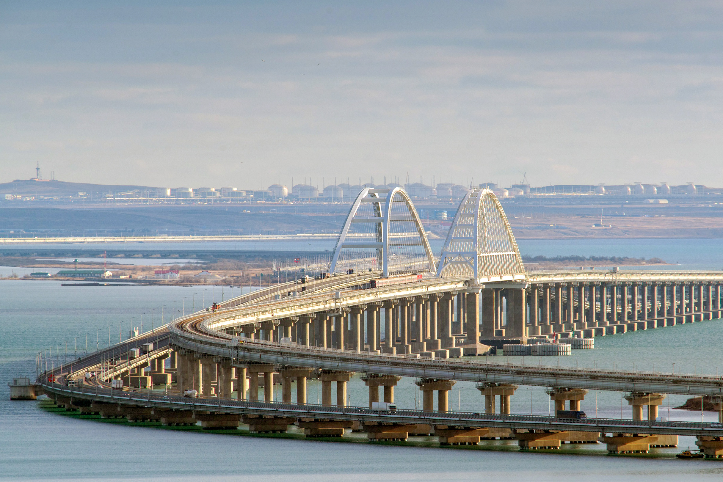 Крымский мост